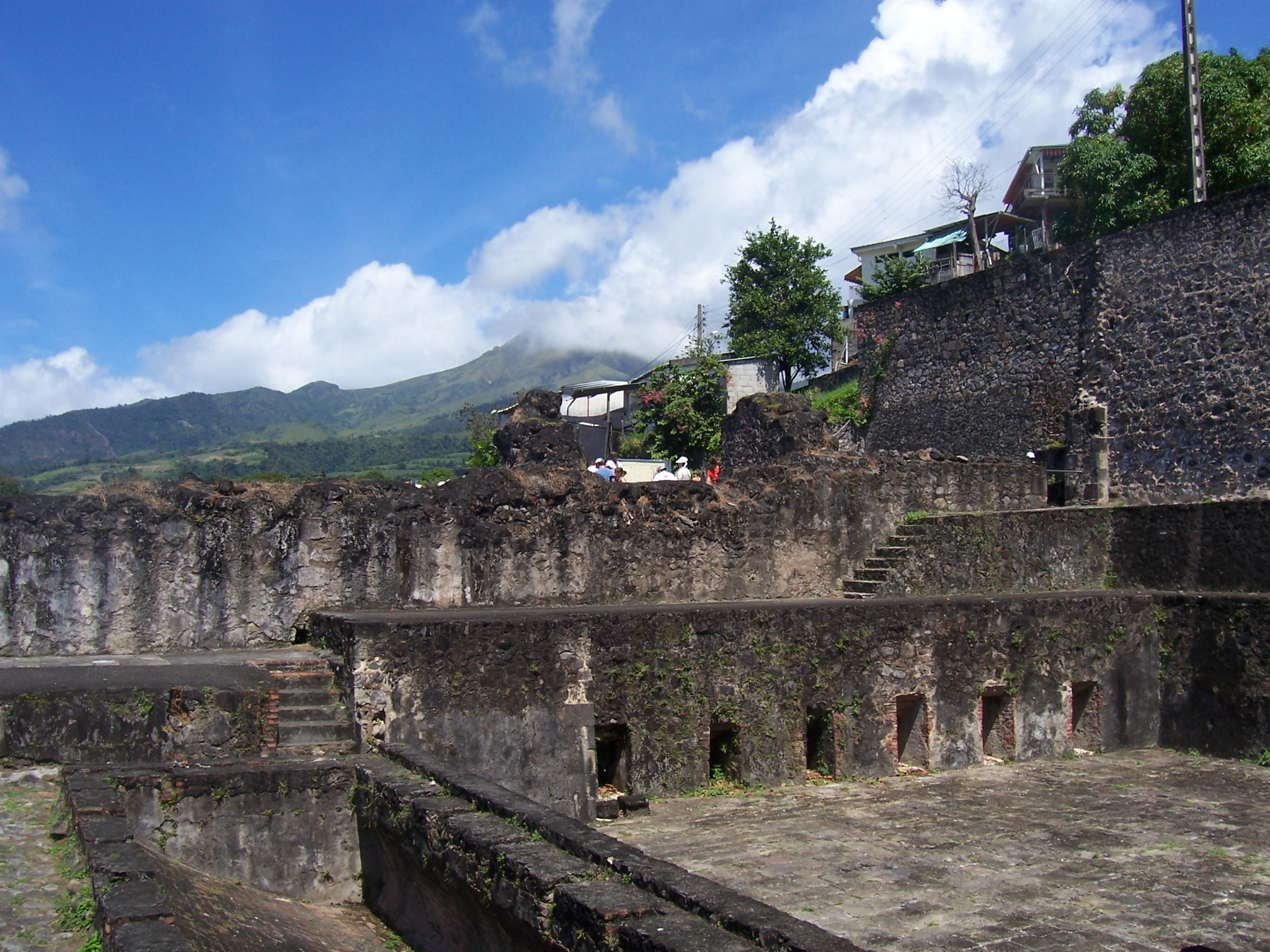 Ruines du théâtre de Saint-Pierre, détruit par l'éruption de la Montagne Pelée